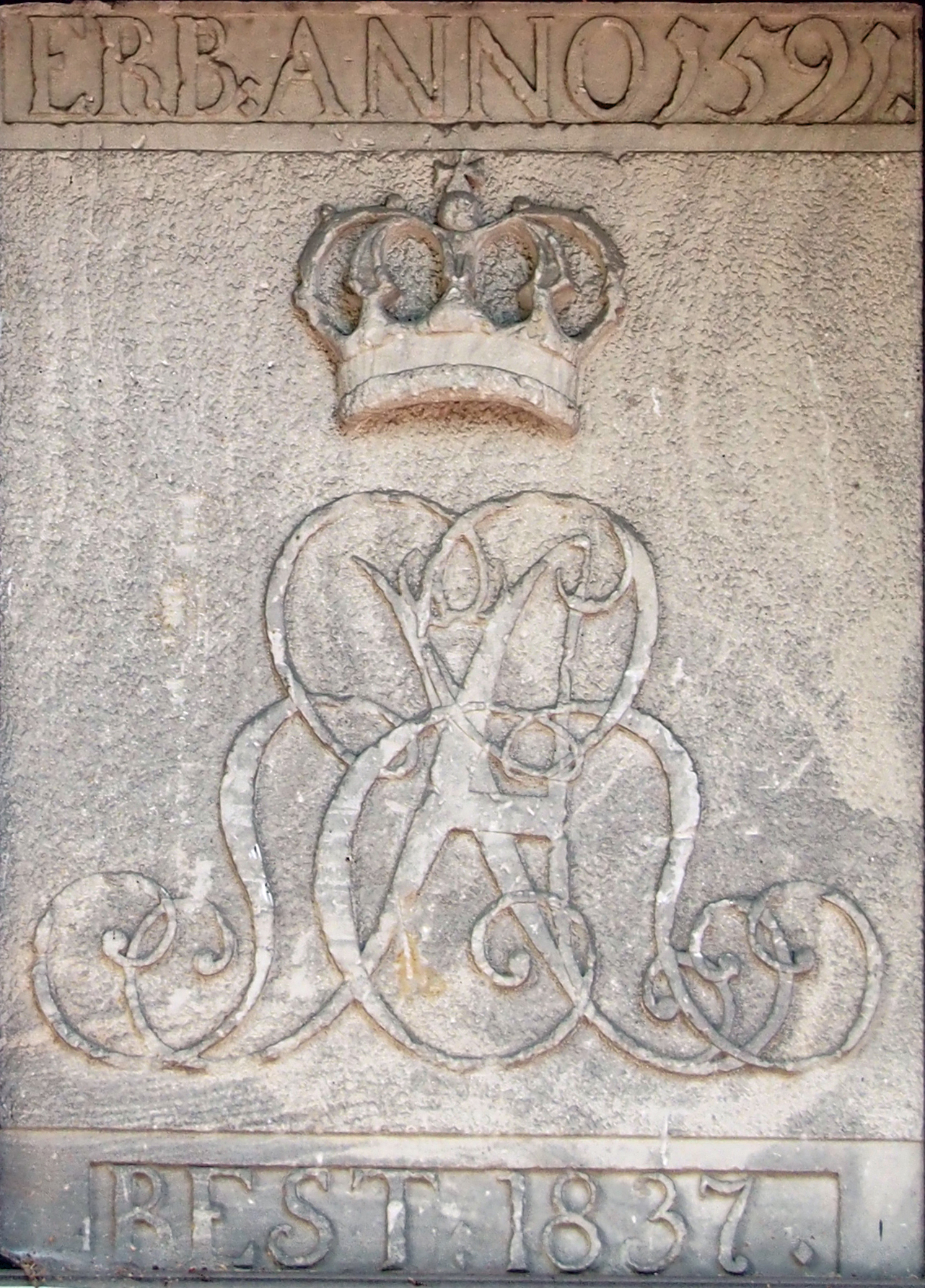 Gekröntes kursives Monogramm Ernst August I. von Hannover "EAR"(Ernst August Rex)am Kulturhaus und ehemaligen alte Rathaus in Wienhausen, Niedersachsen (Germany)